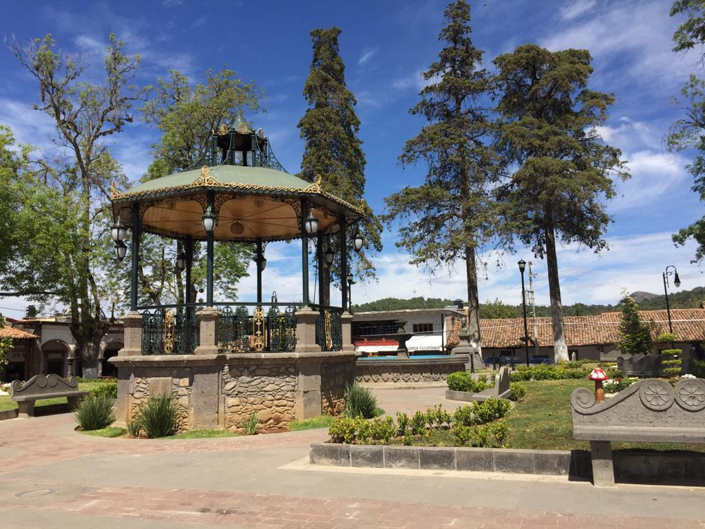 Jardín del Centro, Senguio